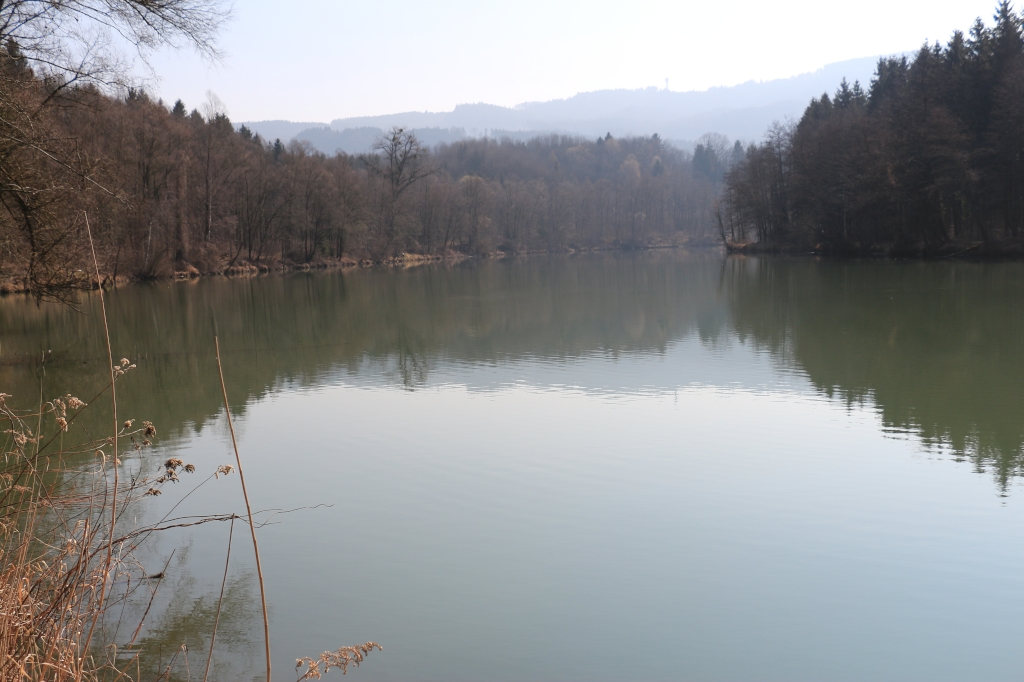 Der Hürdenteich (Ortschaft Weitwörth, Gemeinde Nußdorf am Haunsberg, Bezirk Salzburg-Umgebung